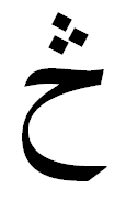 Isolierte Form des paschtunischen Buchstabens Tse